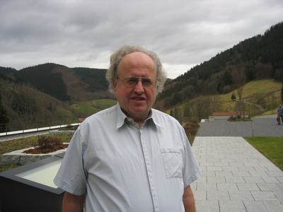 Foto di Helmut Maier